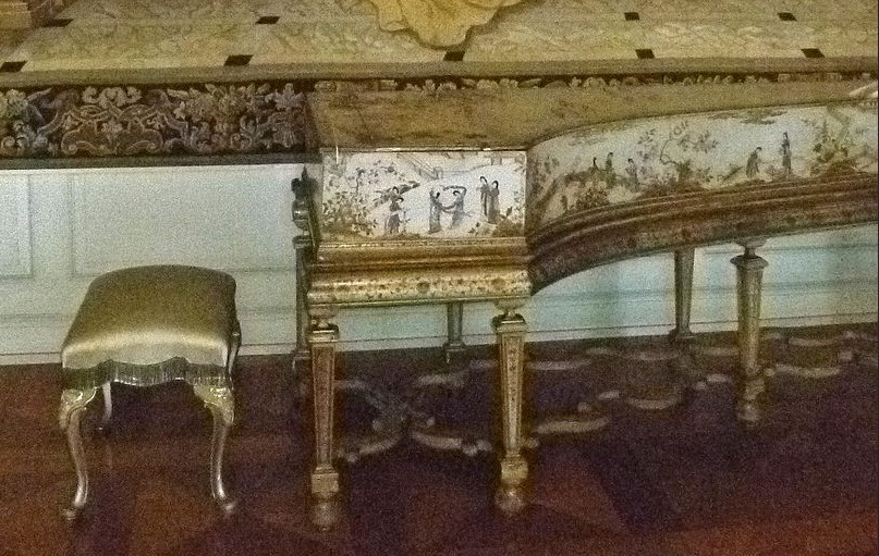 Clavecin par Michael Mietke (vers 1702/1704) décoré par Gérard Dagly - Berlin, Schloss Charlottenburg